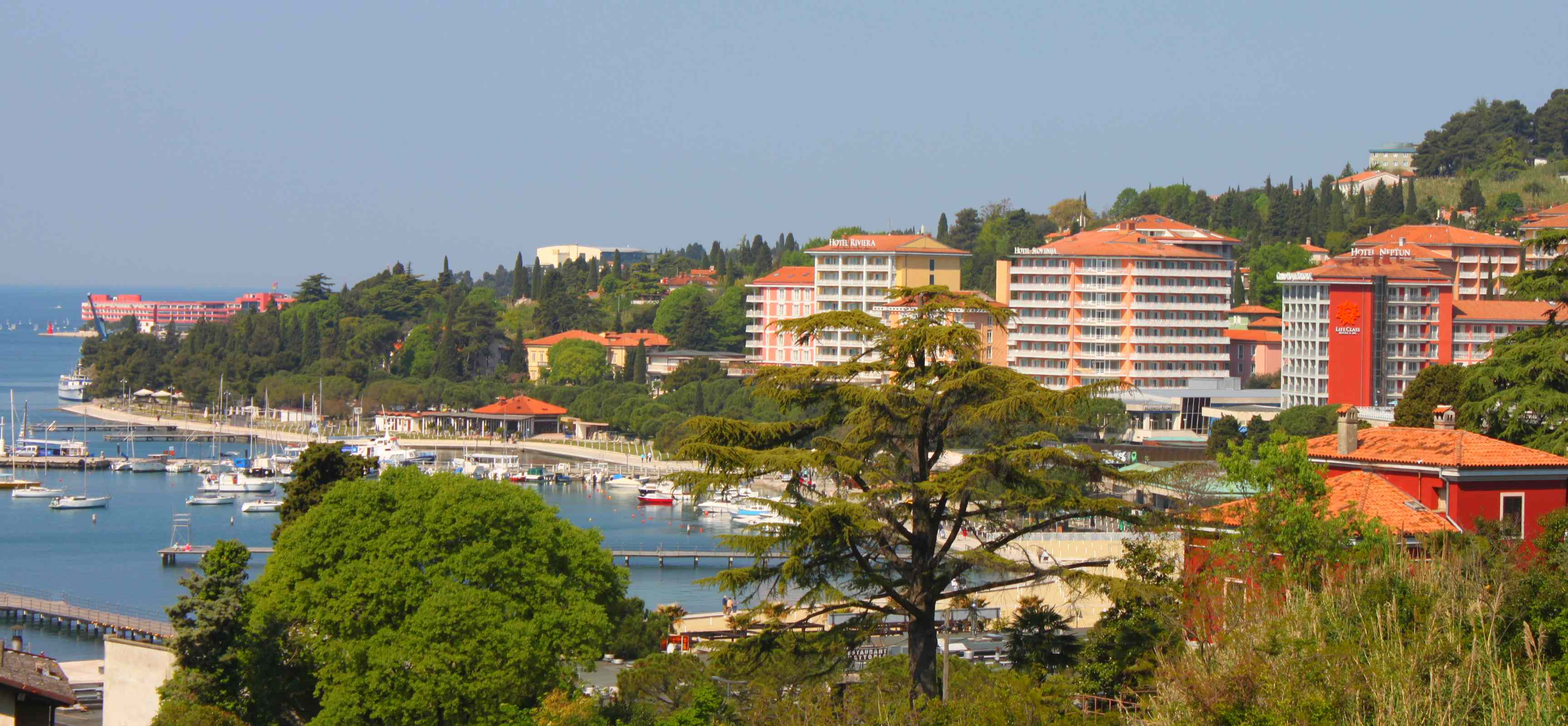 Blick auf Portorož